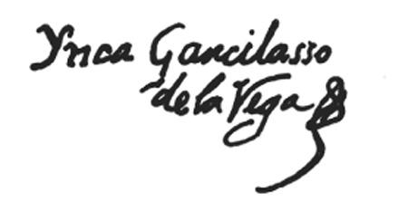 Firma del Inca Garcilaso de la Vega, primer escritor latinoamericano nacido en el Cusco.